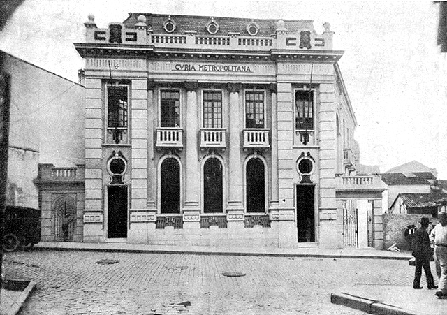 Antigo edifício da Cúria Metropolitana de São Paulo, à Praça Clóvis Bevilacqua.